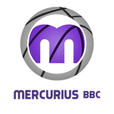 Het logo van de Antwerpse basketbalclub Mercurius BBC